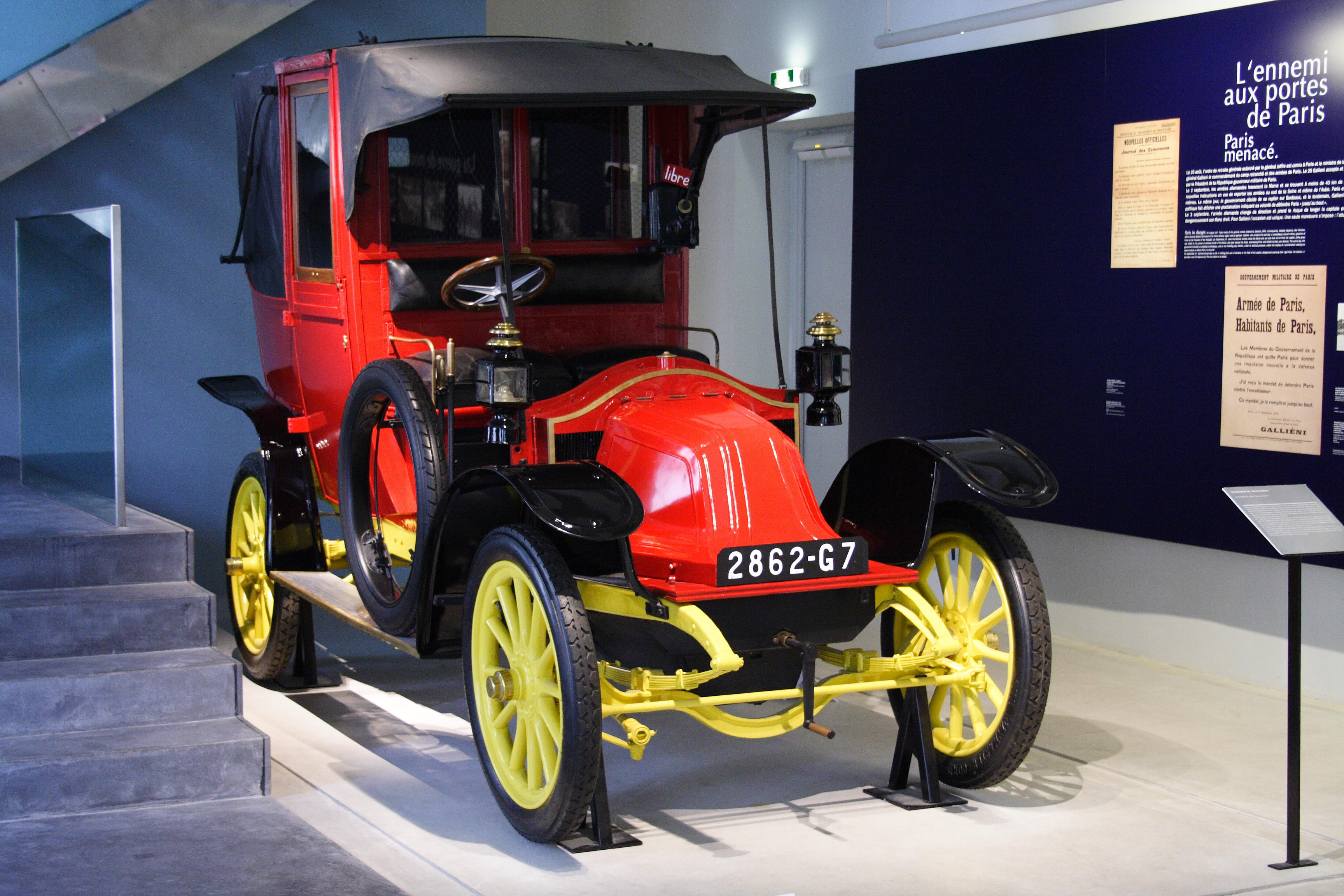 Taxi Renault G7 "Taxi of Marne"(Musée de l'armée, Paris, France)